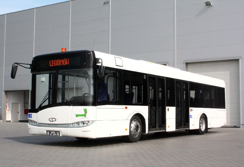 Airport